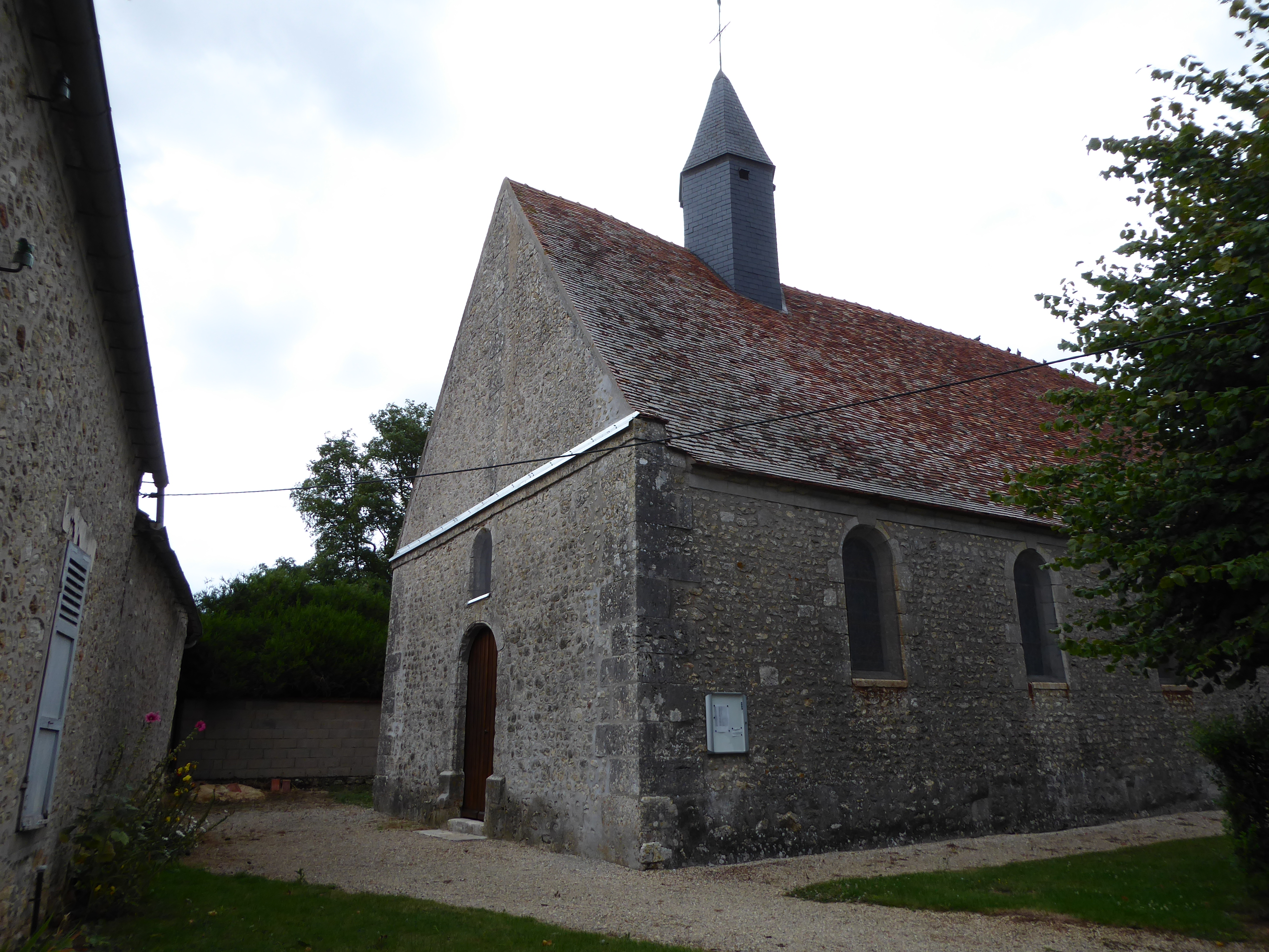 église Saint-Maur, Moinville-la-Jeulin, Eure-et-Loir, France.